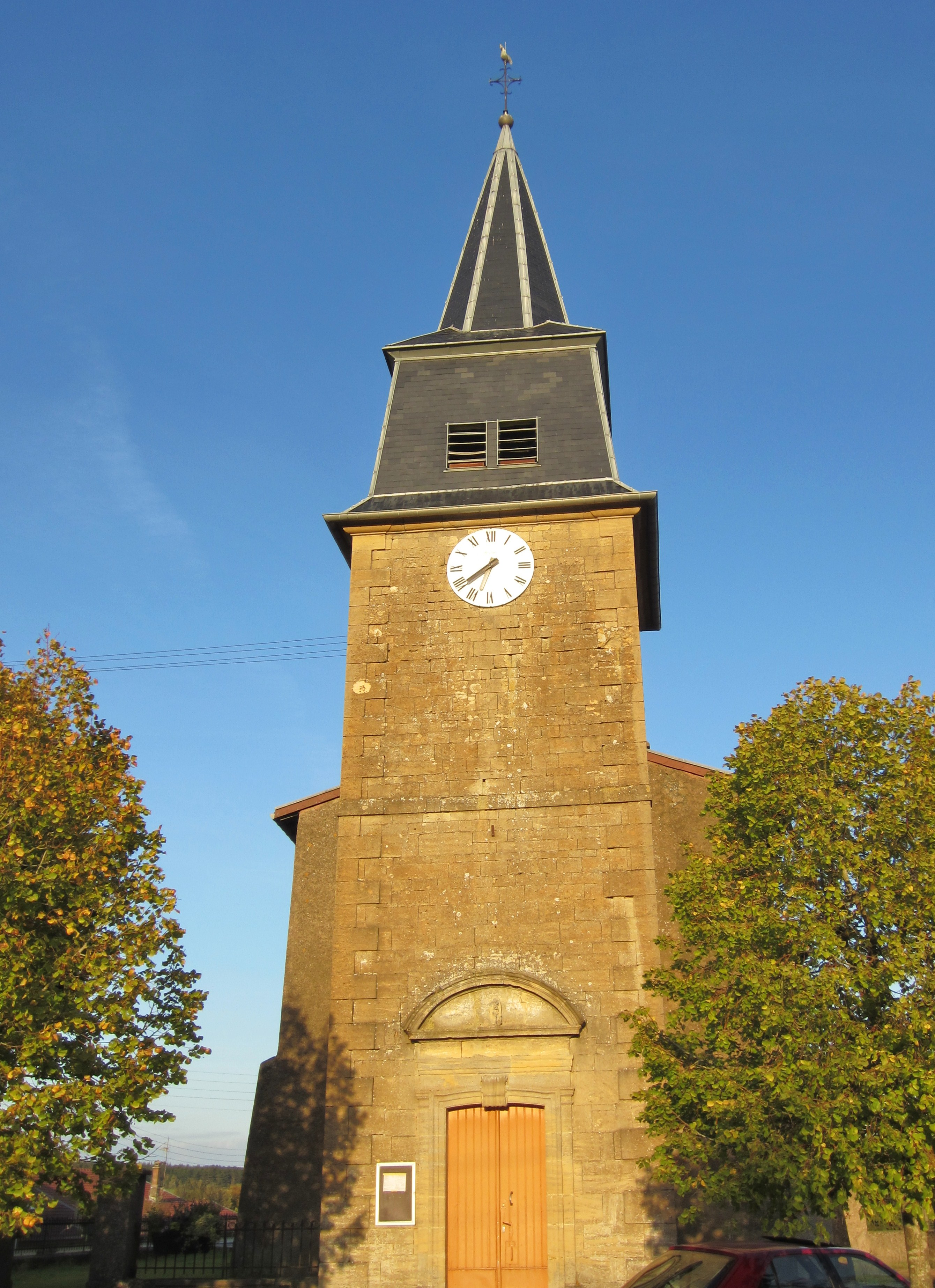 Description eglise Joudreville eglise Joudreville